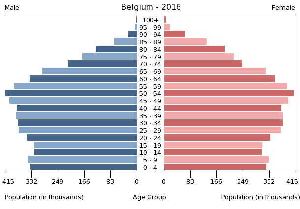 Demografie Belgiens